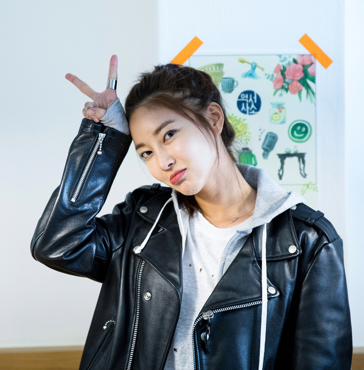 (17.04.02) 대구 보금마켓 플리마켓 직찍 ( NS윤지 ) by 허수아비